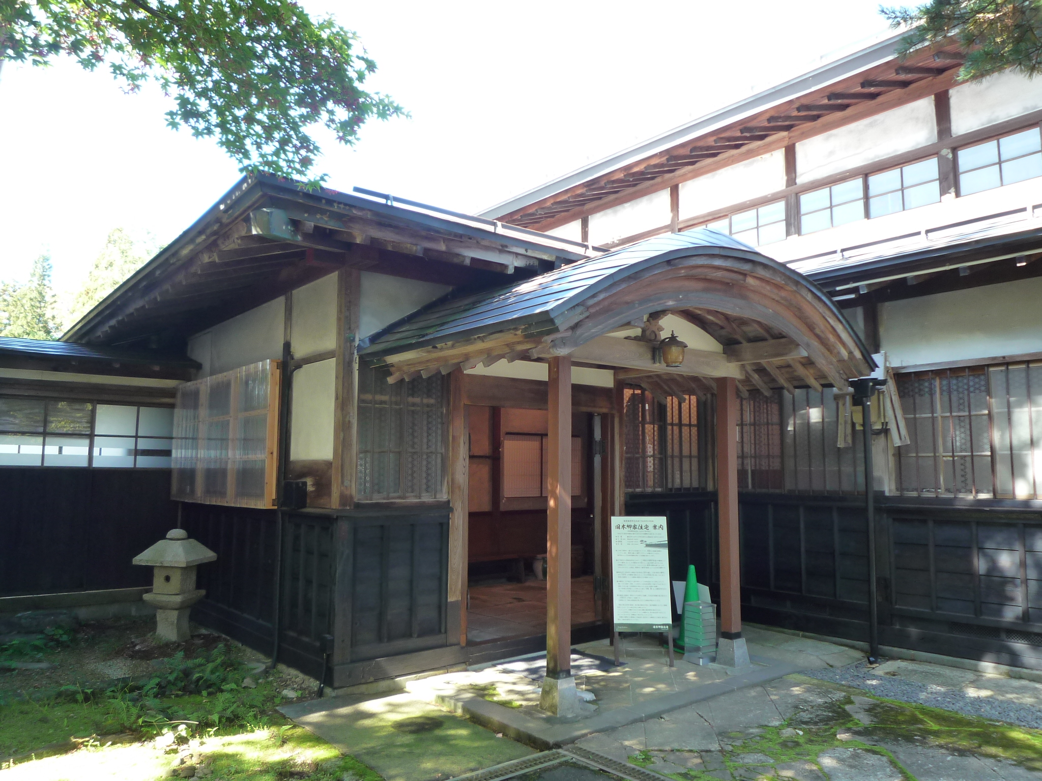 旧本郷家住宅の玄関前